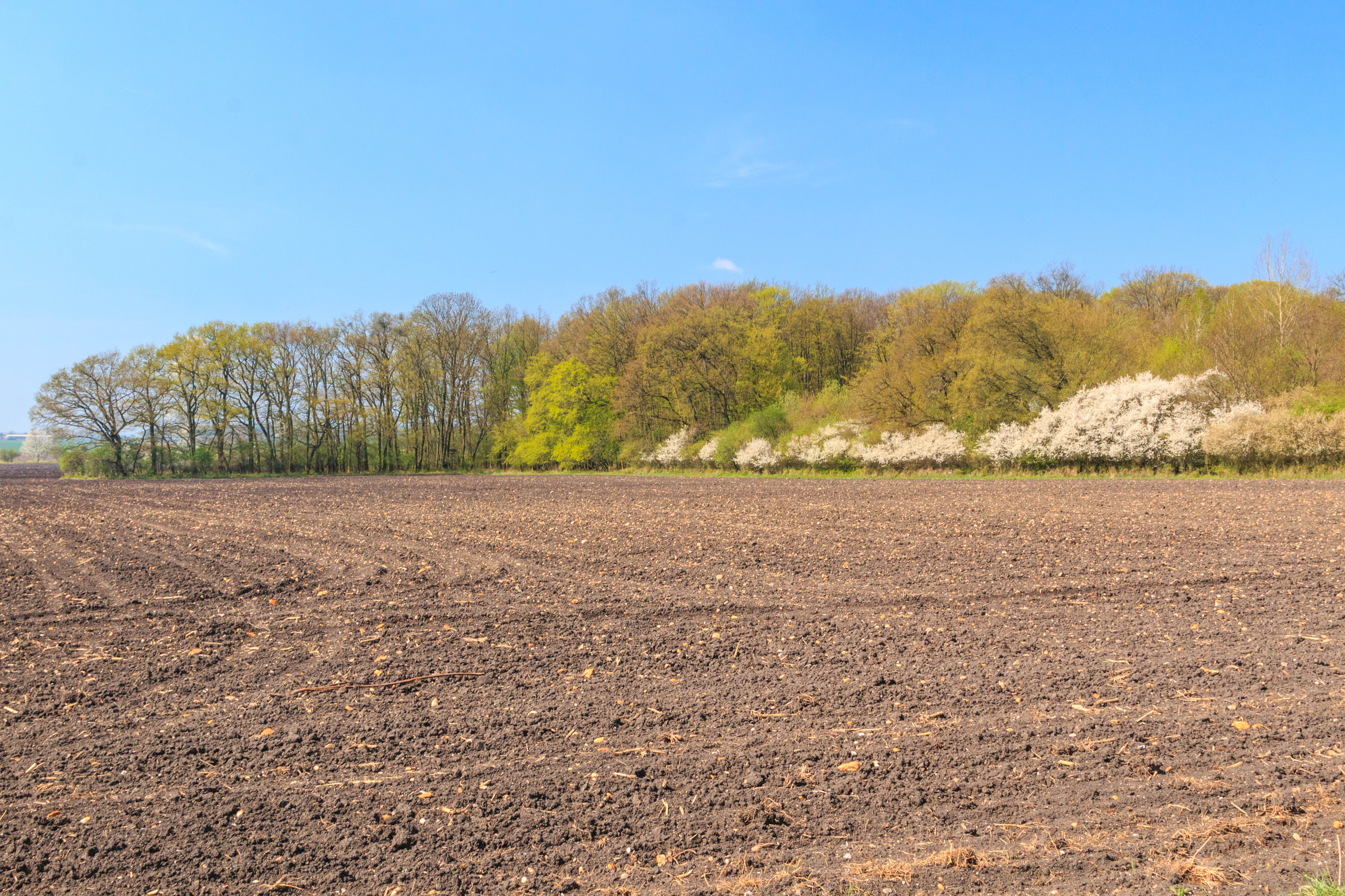 PP Žiželický les Project: Vodstvo.